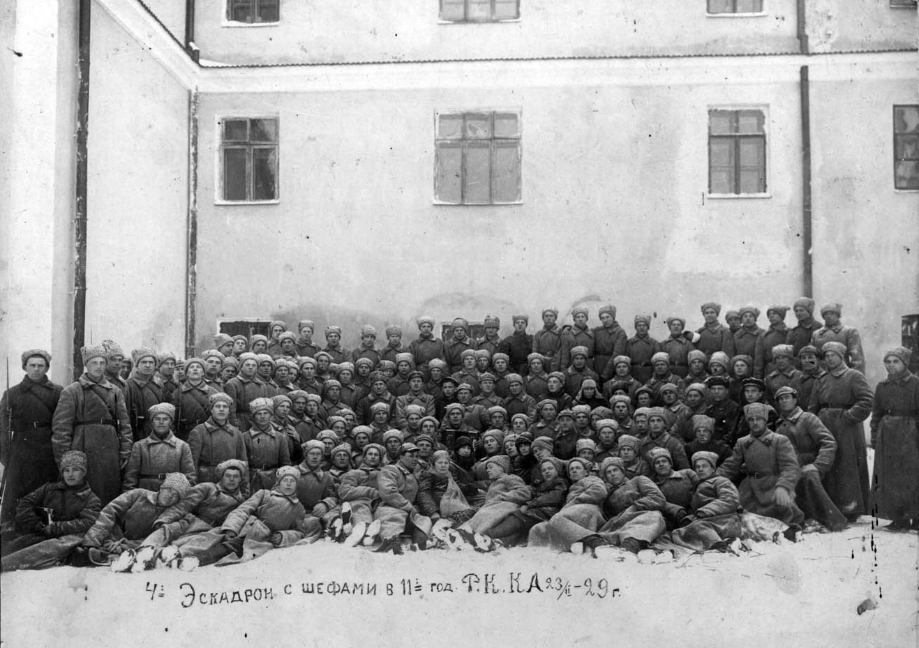 Четвертий ескадрон восьмої окремої кавалерійської дивізії.